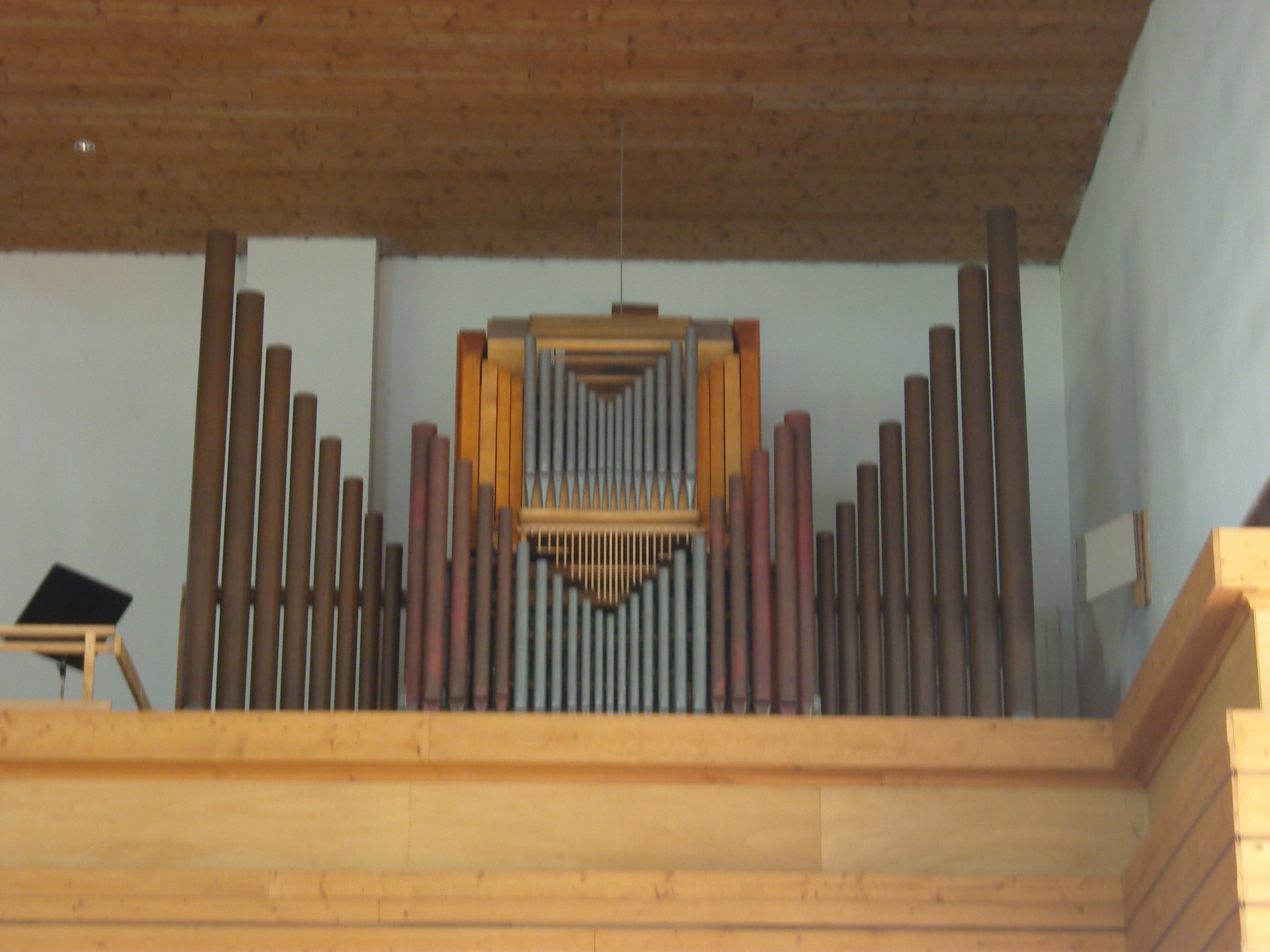 Orgel in der Josephskirche in Dresden-Pieschen